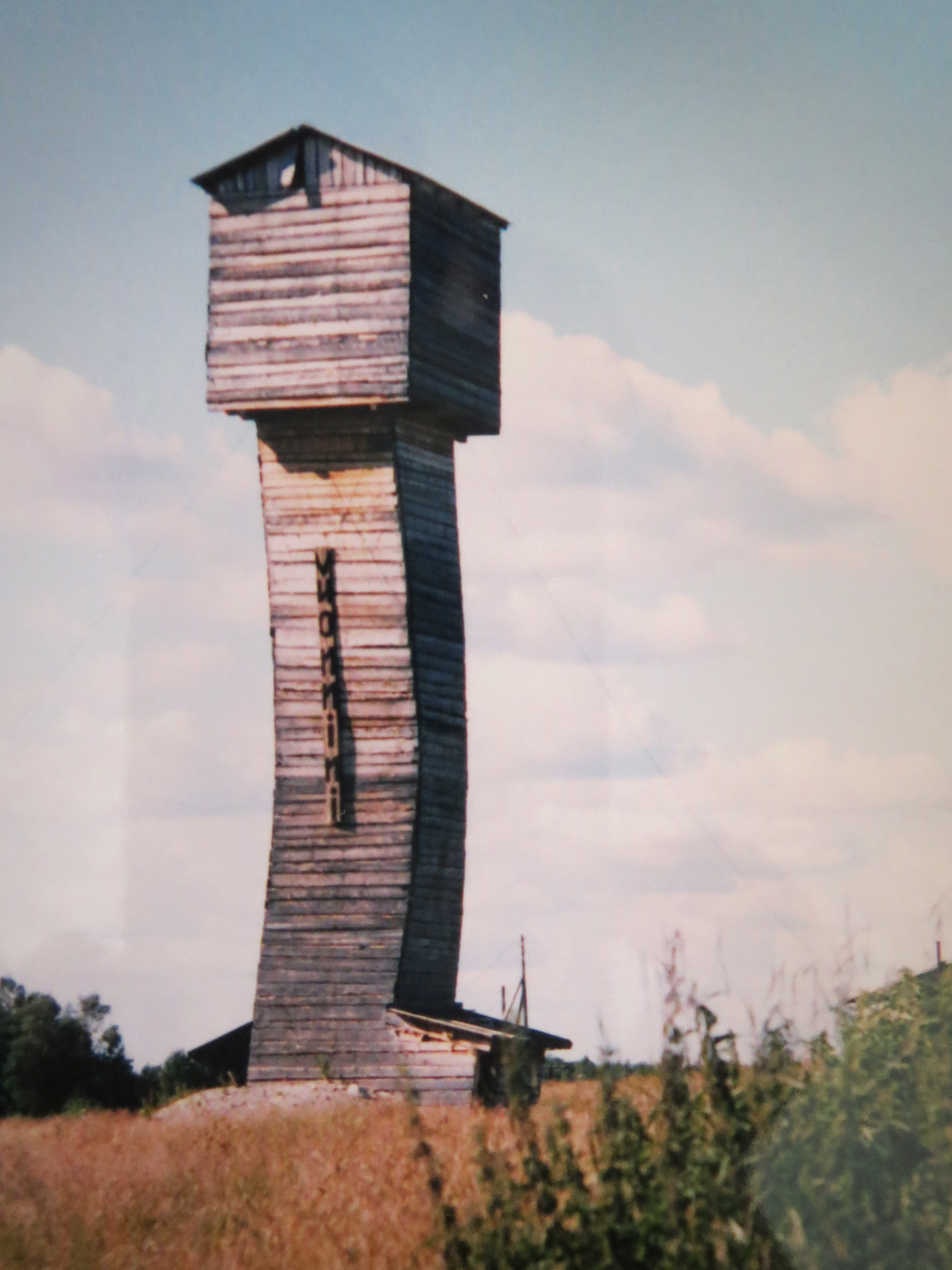 Vuonnisen vesitorni, alkuperäinen kuva heinäkuu 1996, omasta kotialbumista